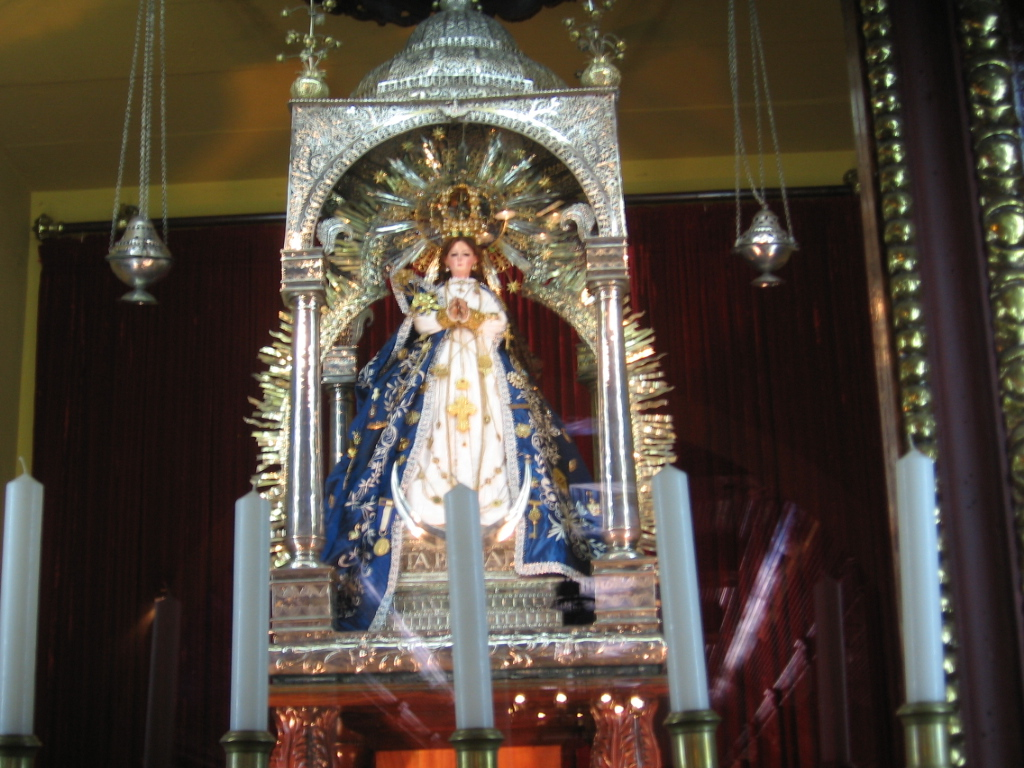 Imagen de la Virgen del Trono